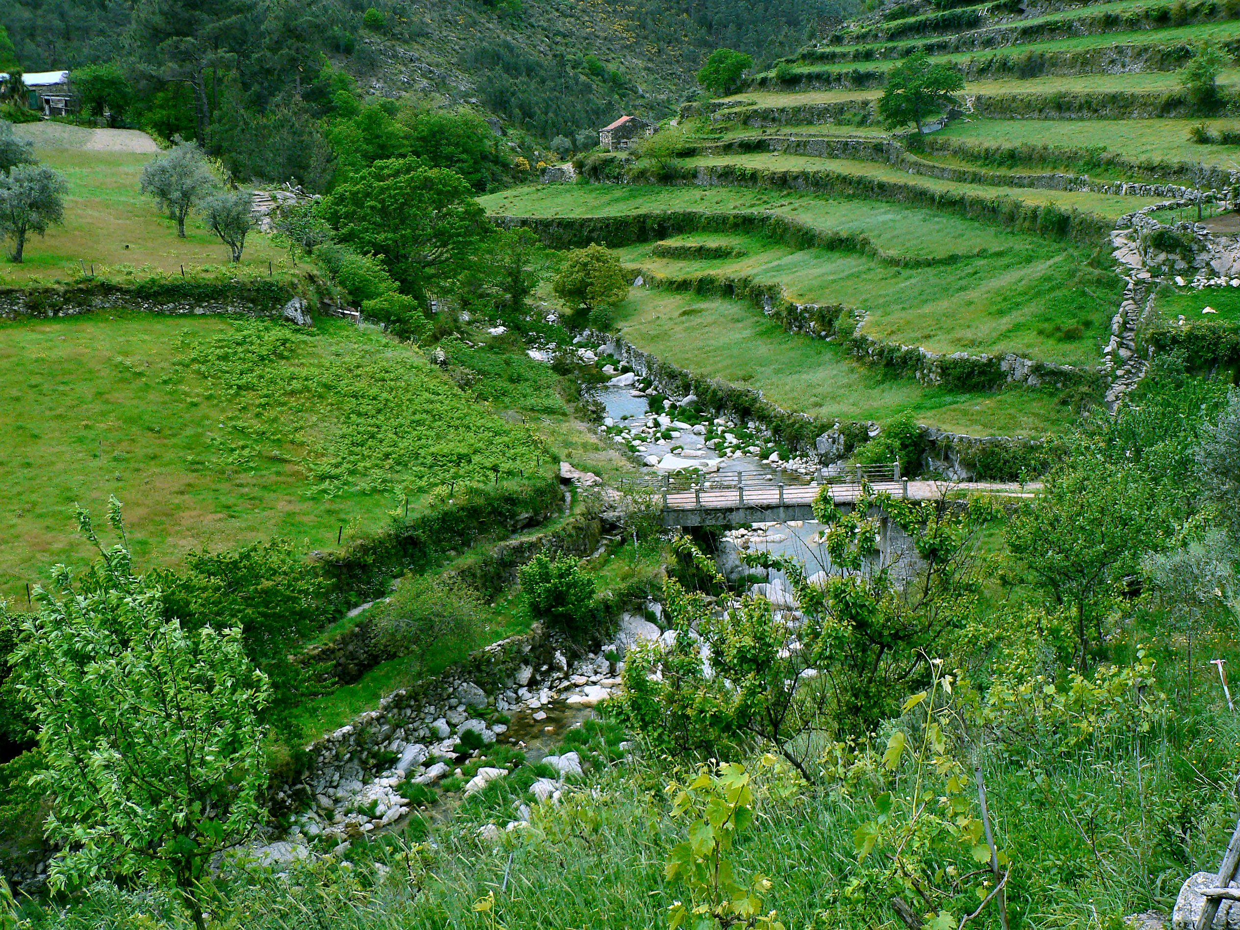 Junção das ribeiras da Nave e de São Bento em Loriga